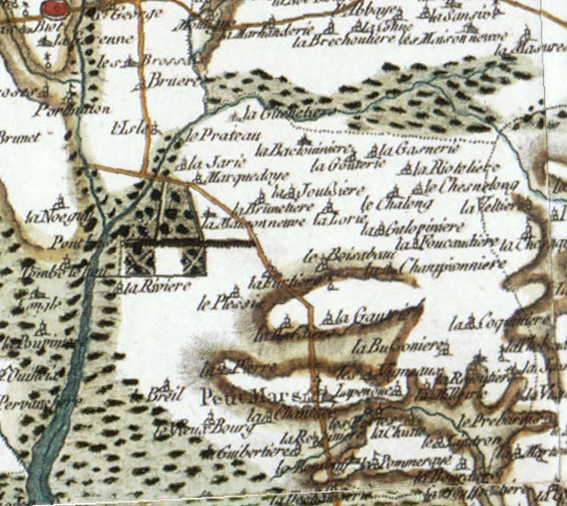 La paroisse de Petit-Mars.